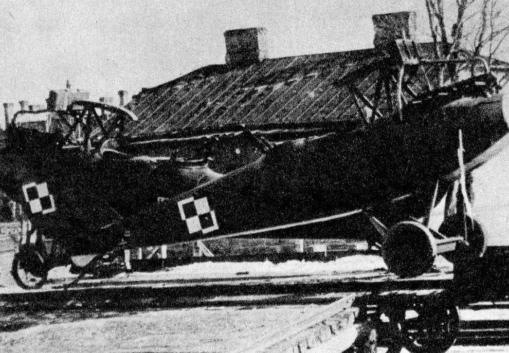 Samoloty LVG C-V (numery 9.7 i 9.10) zmodernizowane na poznańskiej Ławicy poprzez wbudowanie silników Austro-Daimler.